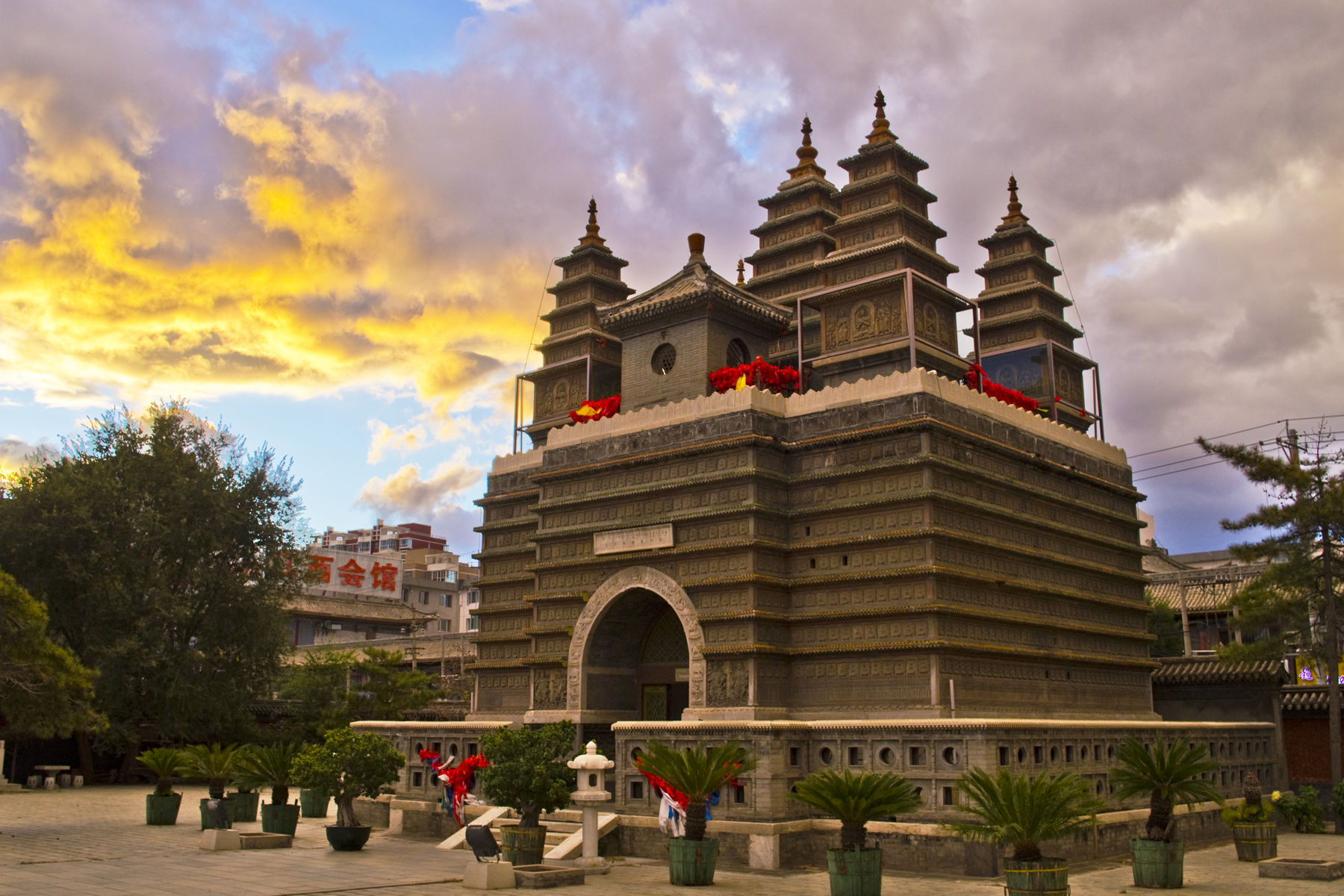 中文（中国大陆）: 金刚座舍利宝塔